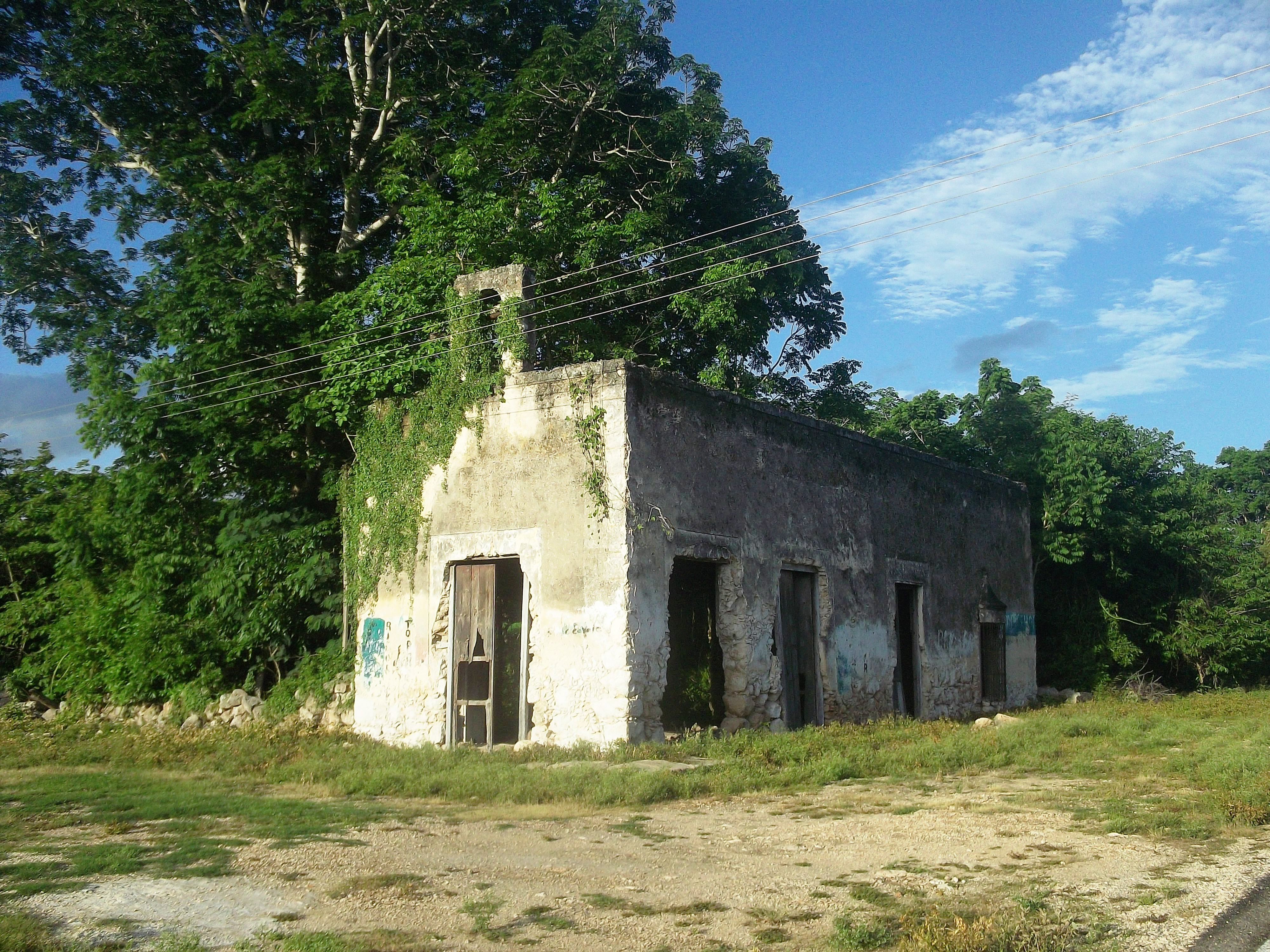 Hacienda de Cibceh, Yucatán.